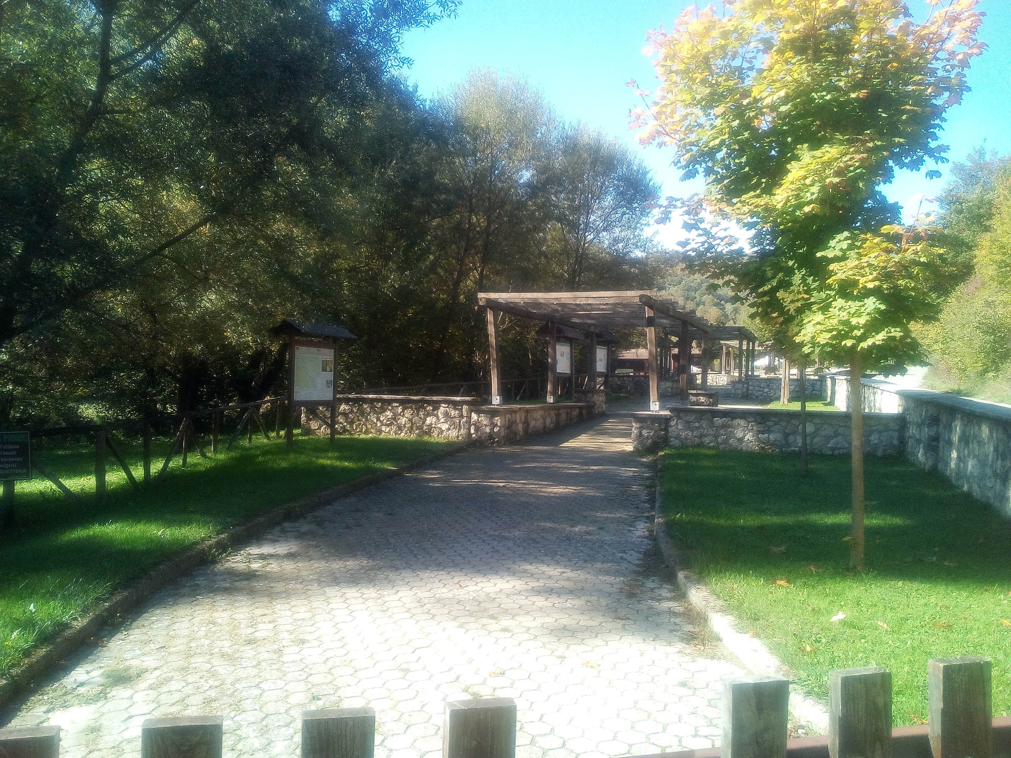 Accesso alle grotte di Val de' Varri, Pescorocchiano, Italia